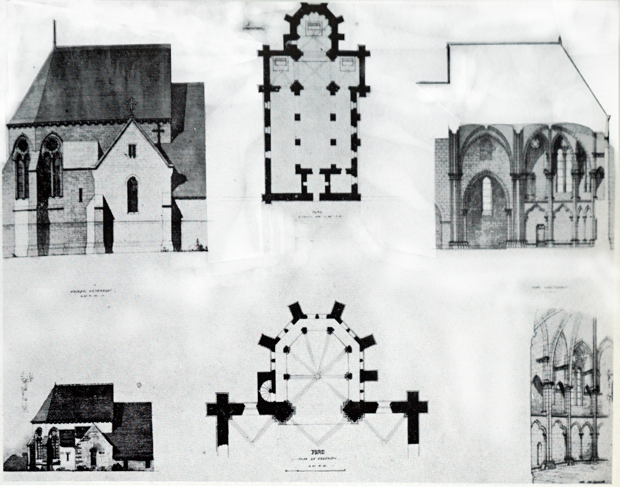 plans de l'église de Rieux.